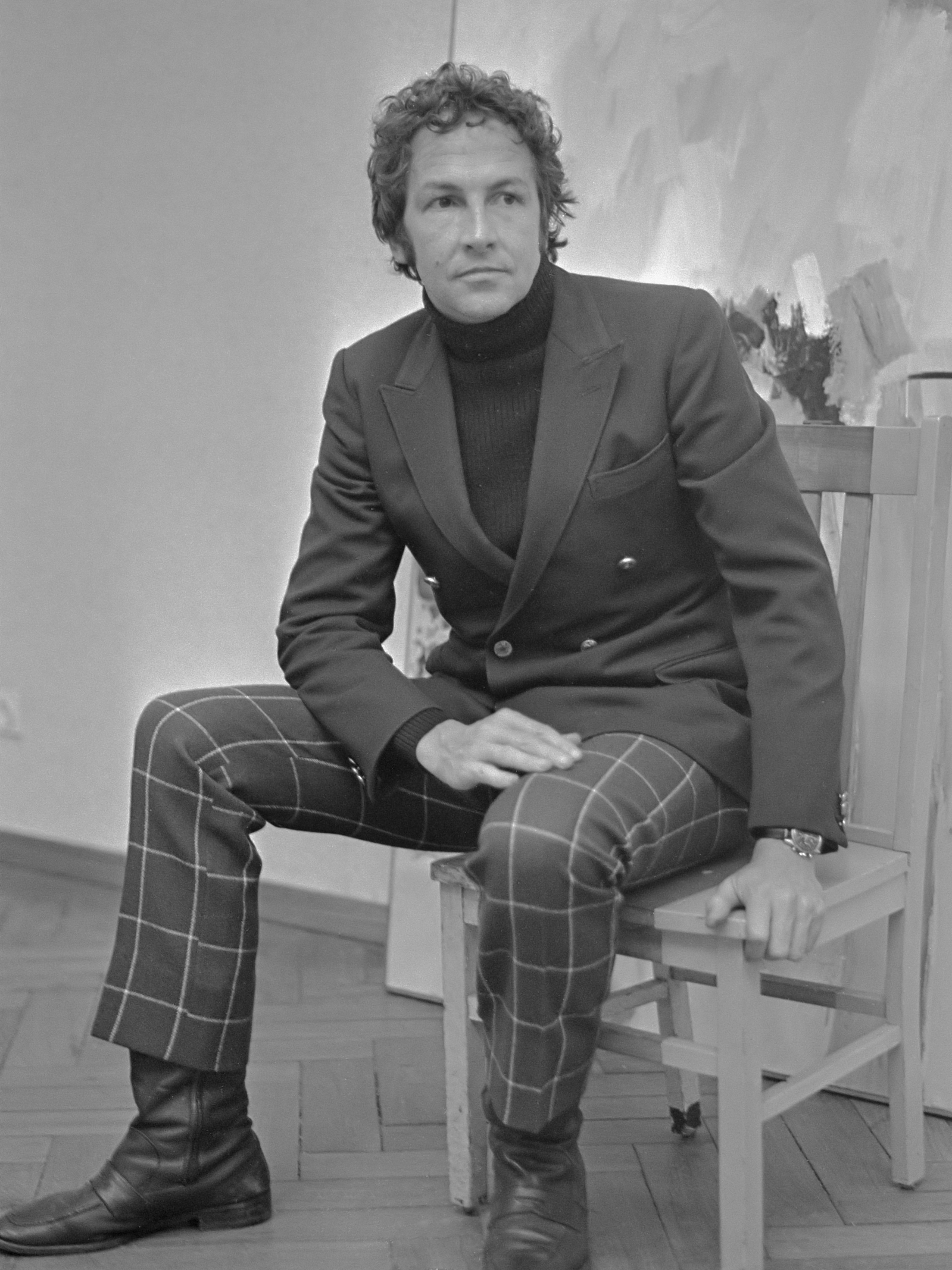 Robert Rauschenberg exposeert in Stedelijk Museum, zit hier op eigen kustwerk 21 februari 1968